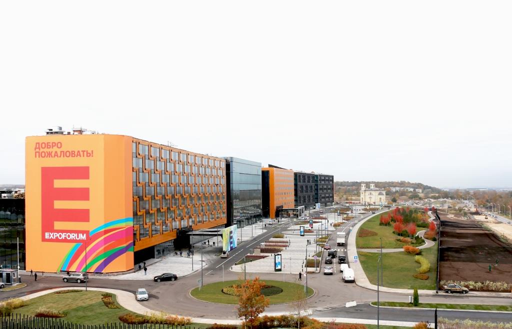 Общий вид конгрессно-выставочного центра Экспофорум